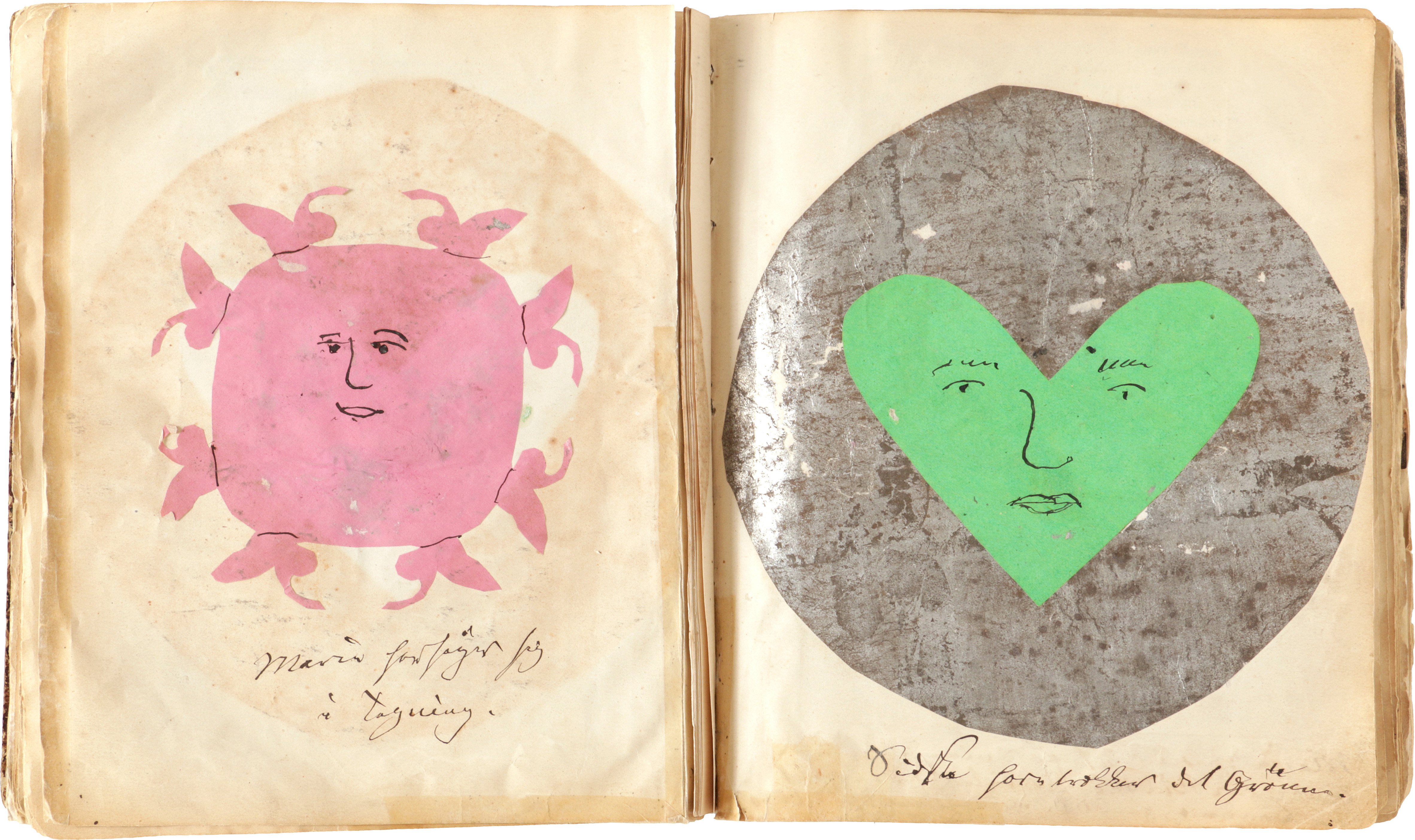 H.C. Andersen: Marie Henriques’ picture book (1868-69)